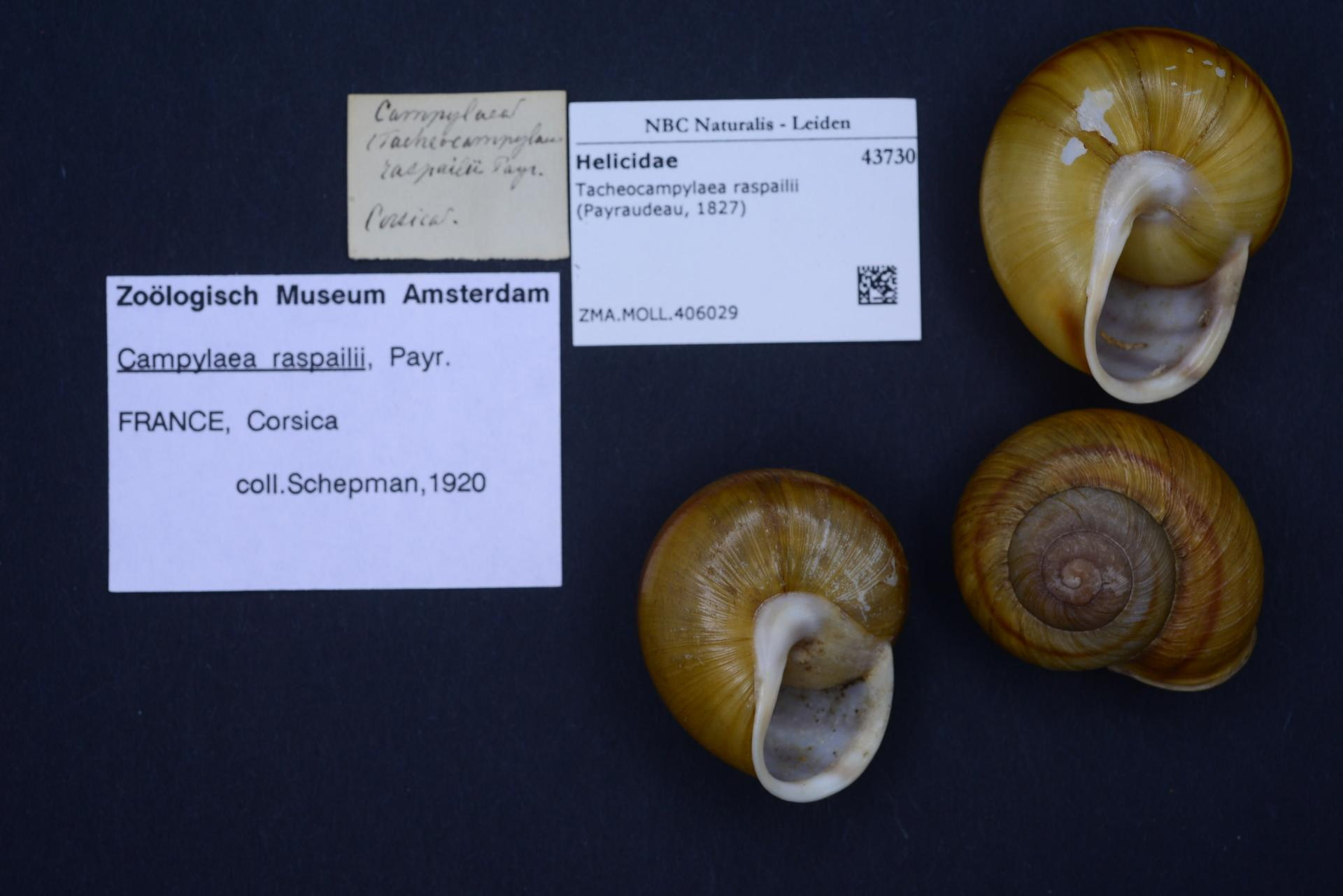 Tacheocampylaea raspailii (Payraudeau, 1827)